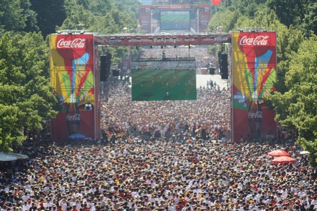 Bild der Berliner Fanmeile 2010 auf der Straße des 17. Juni 2010. Blick vom Presseturm.